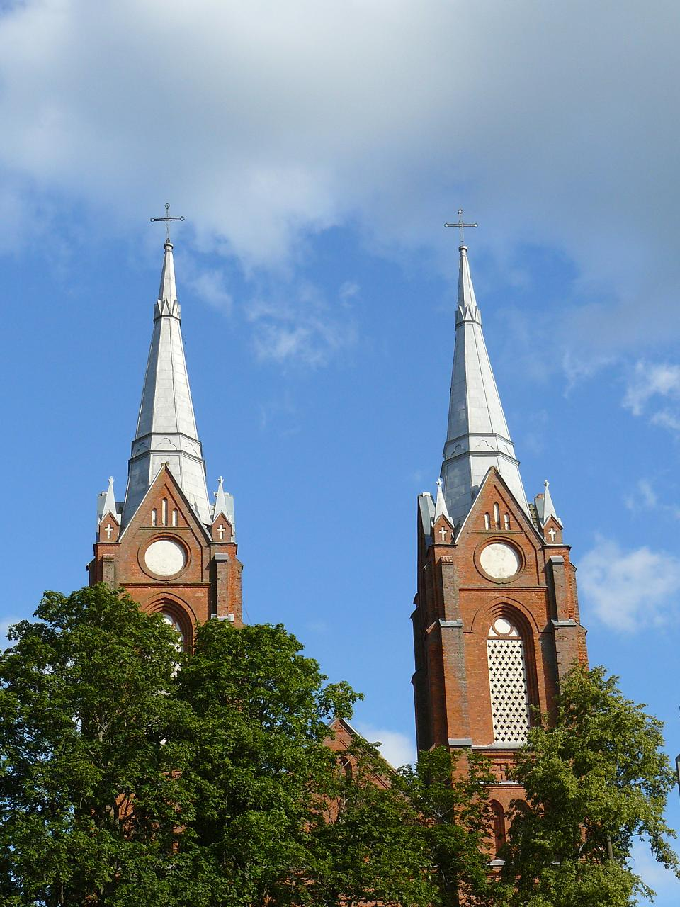 Gimtosios parapijos bažnyčia.